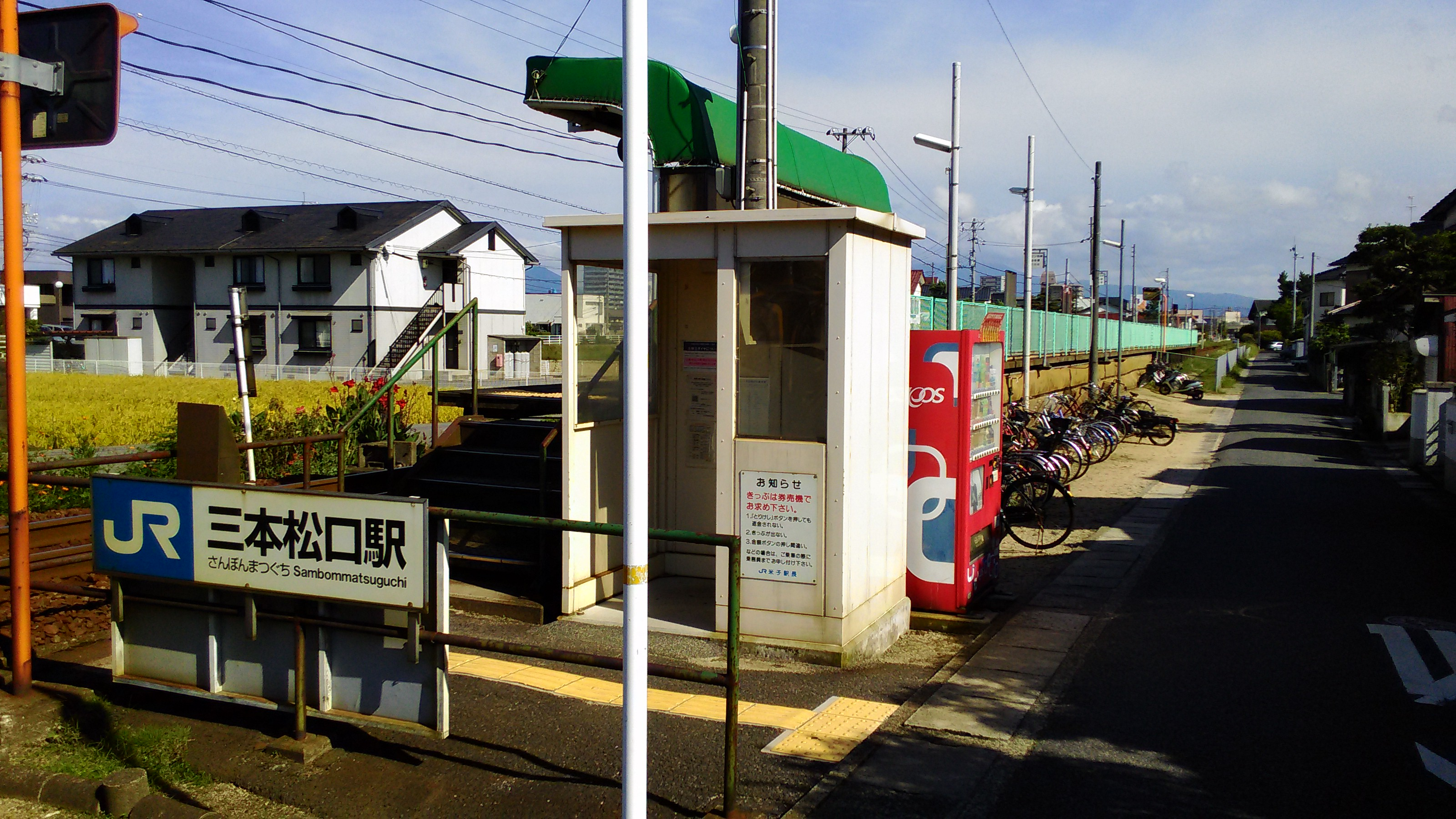 JR西日本境線三本松口駅